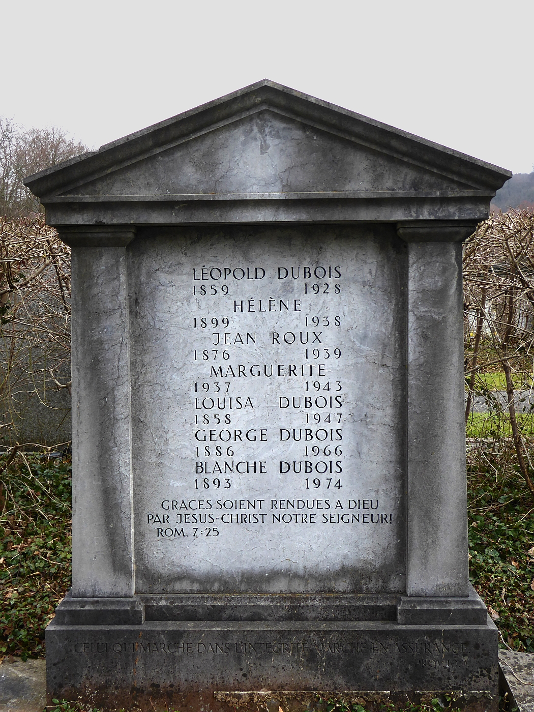 Jean Roux (1876–1939) Zoologe, Herpetologe, Forscher, Grab auf dem Friedhof Hörnli, Riehen, Basel-Stadt